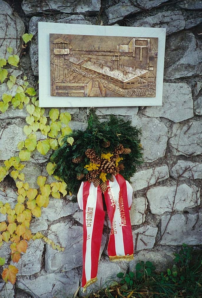 Stalag_XVIIA